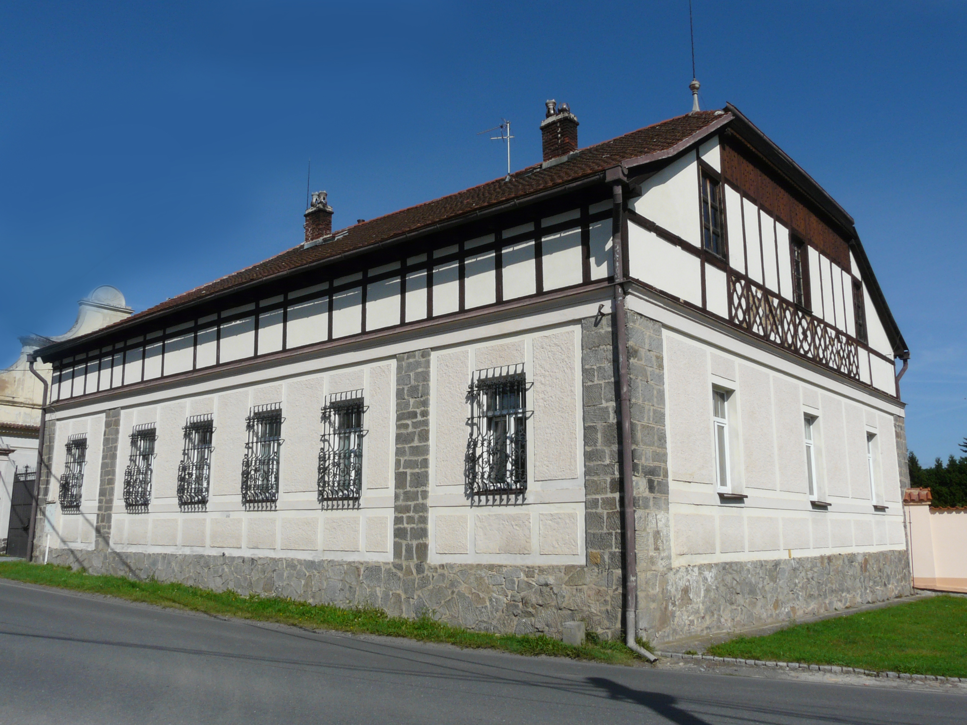 Zemědělský dvůr - bý. panský dvůr (Štěnovice), Štěnovice 162